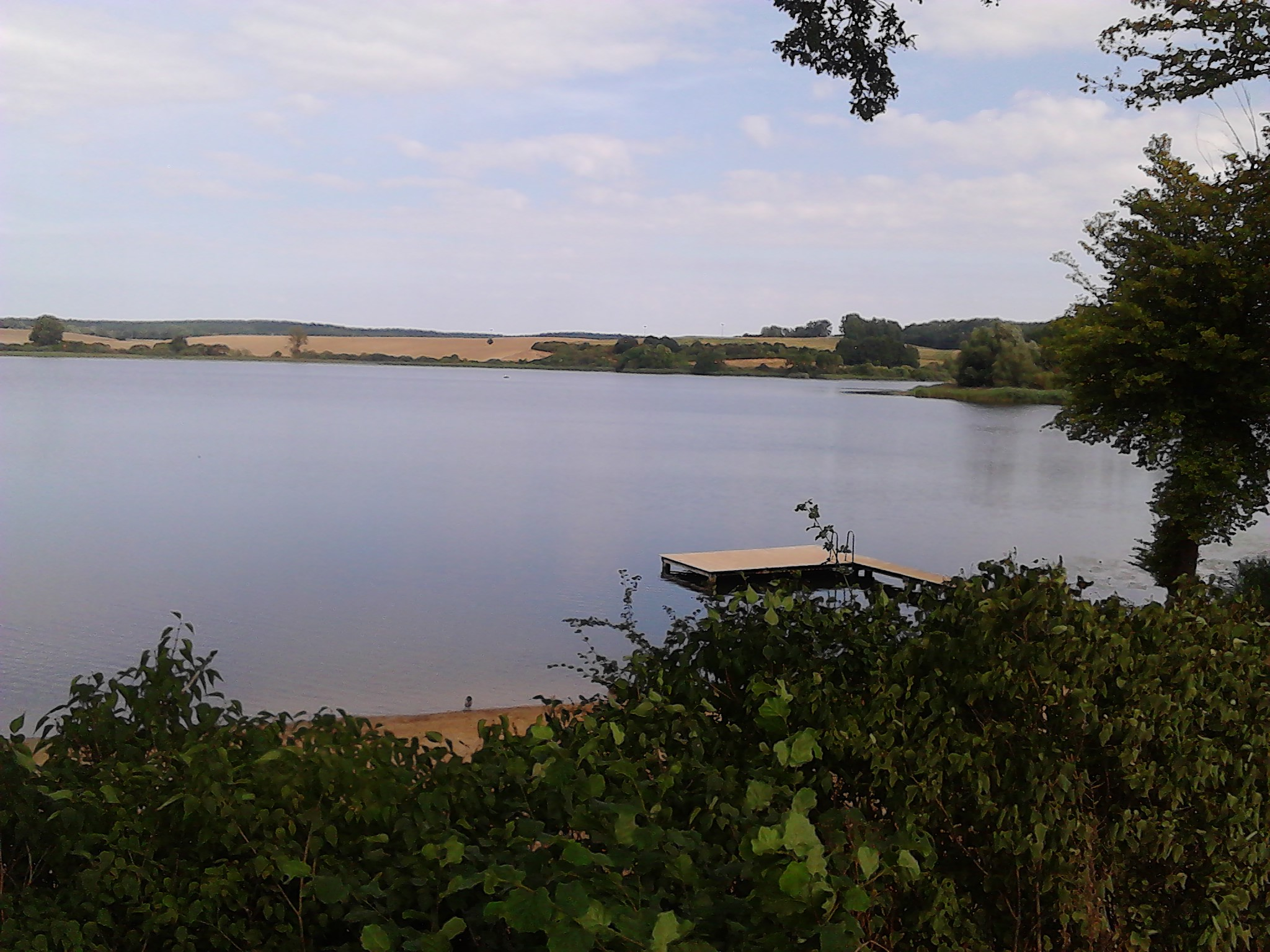 Luckower See near Sternberg